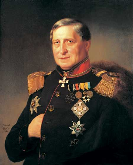 Gottlieb Heinrich Schmückert, Preußischer Generalpostmeister, Öl auf Leinwand, 72×58 cm